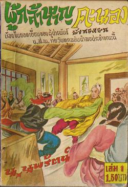 ภาพจากท่านมือปีศาจ เว็บ